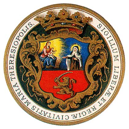 Wappen der Stadt Subotica